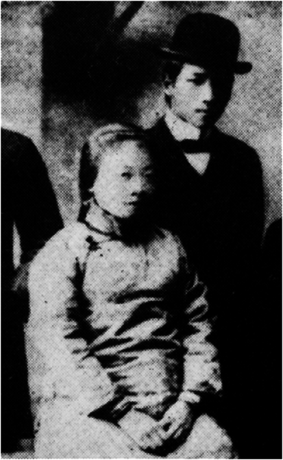 He Zhen (chinois : 何震 ; pinyin : Hé Zhèn), née vers 1884, morte vers 1920, est une féministe et anarchiste chinoise.